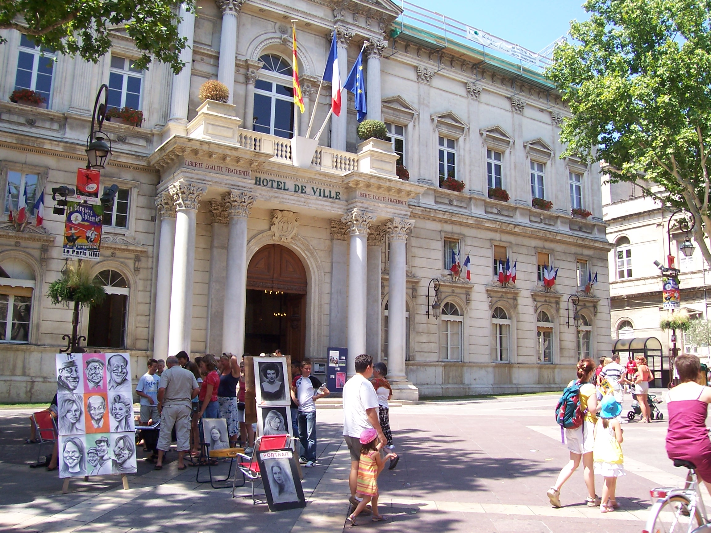 Avignon - Hotel de Ville - 2006